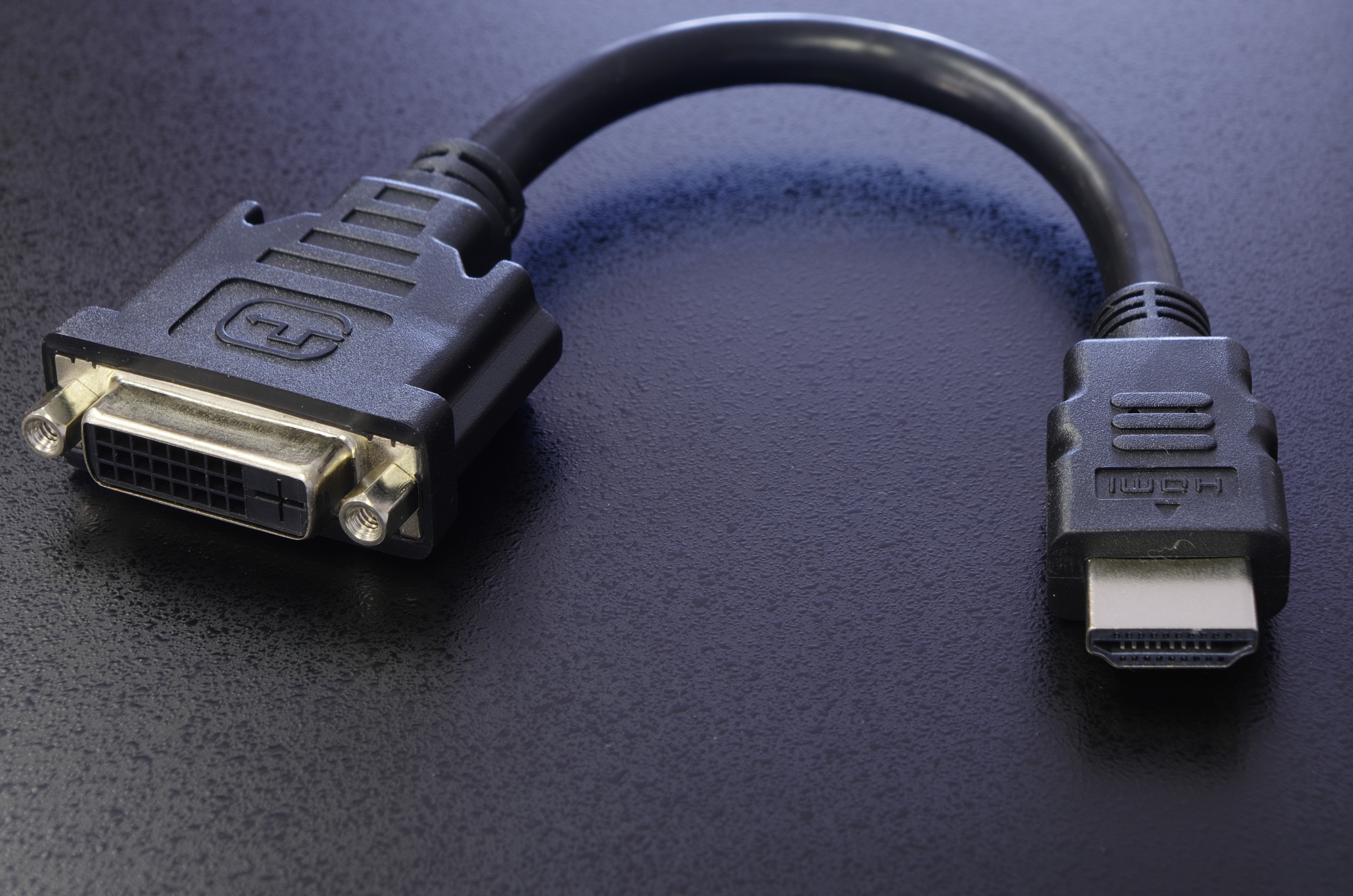 HDMI-Grafikkarte an DVI-Monitorkabel